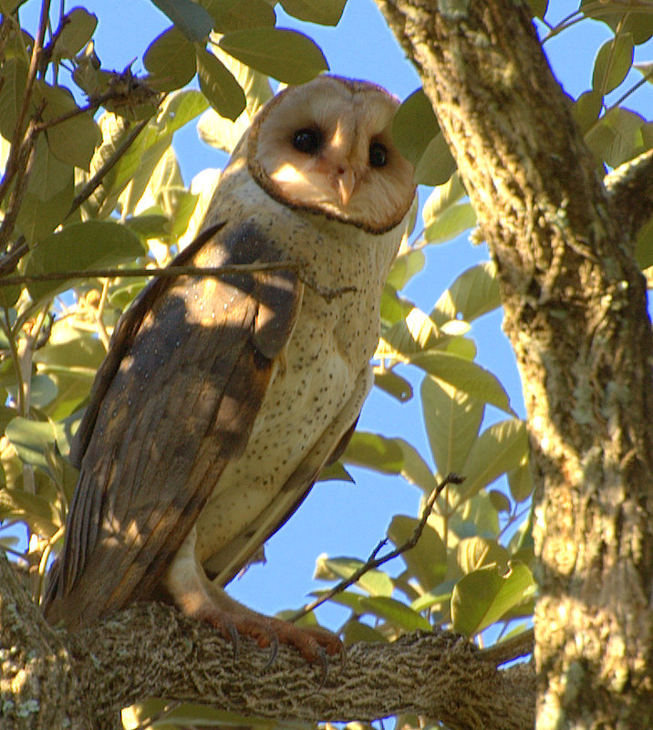 Tyto furcata tuidara, Fazenda do Estado, localizada no município de Manduri-SP